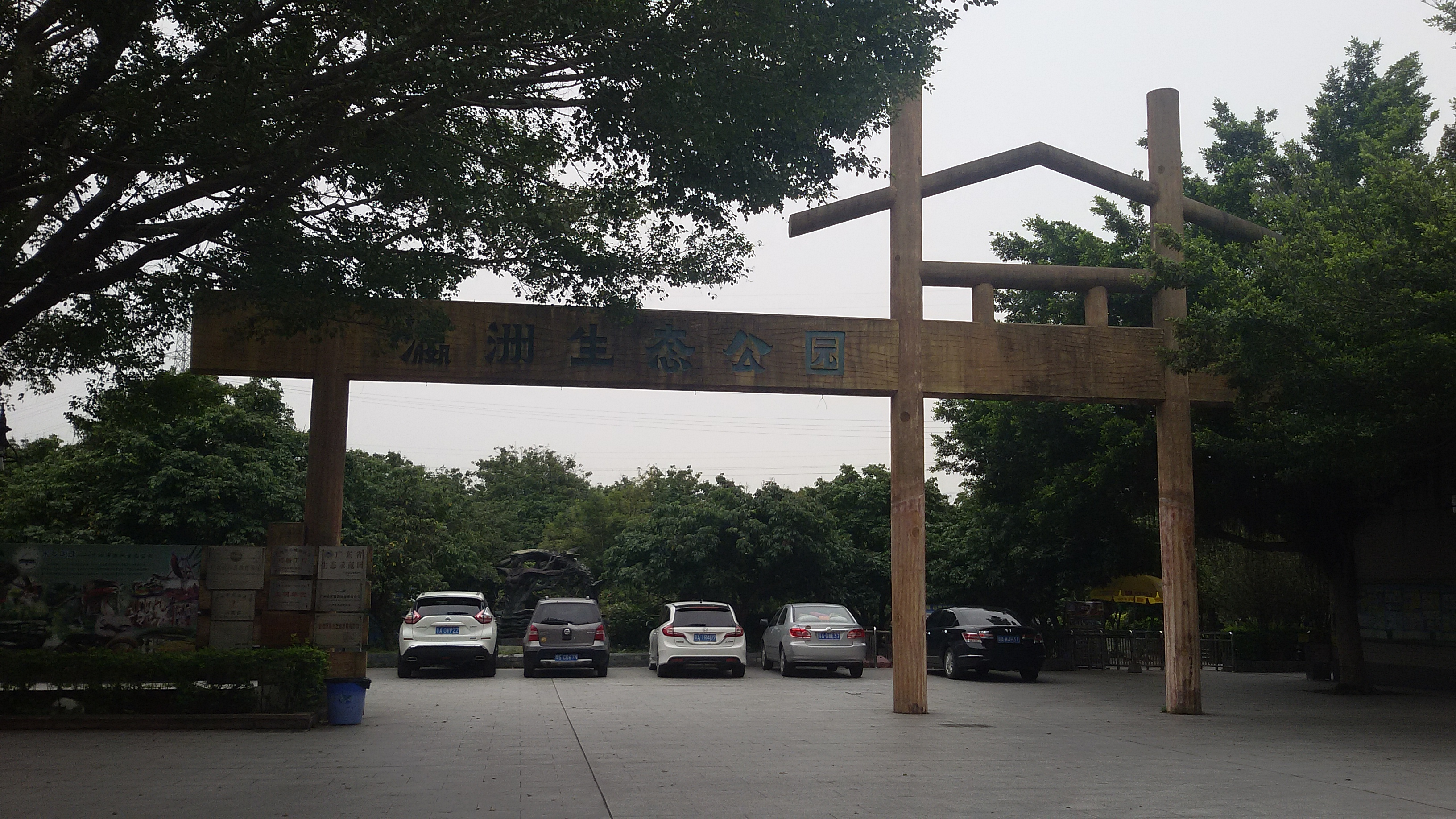 粵語: 瀛洲生態公園正門